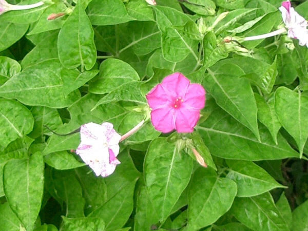 Mirabilis jalapa taken in Hyogo, Japan.